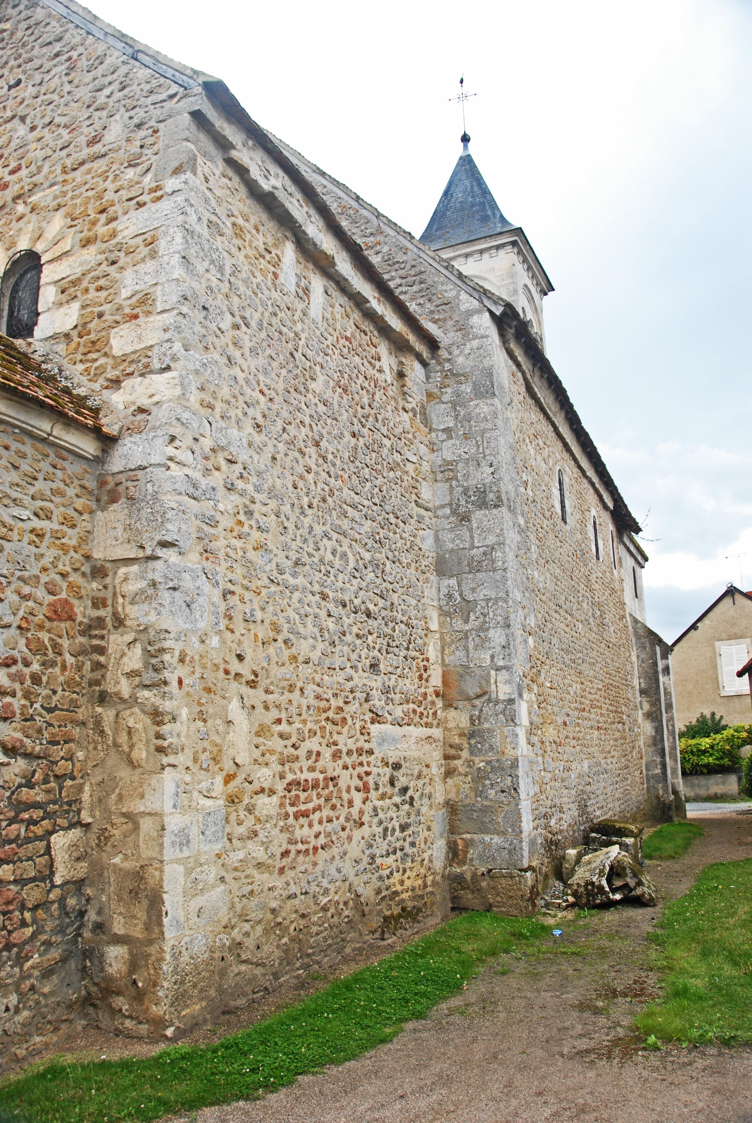 Nordseite